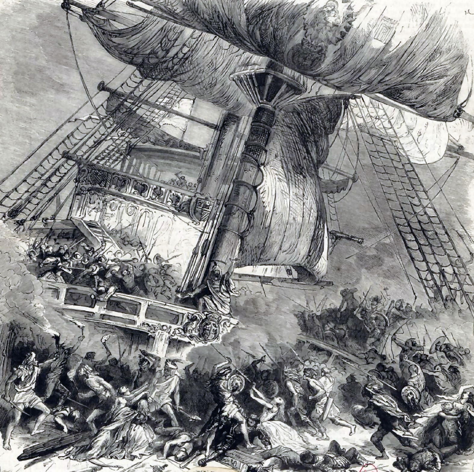 Acte III de L'Africaine de Meyerbeer